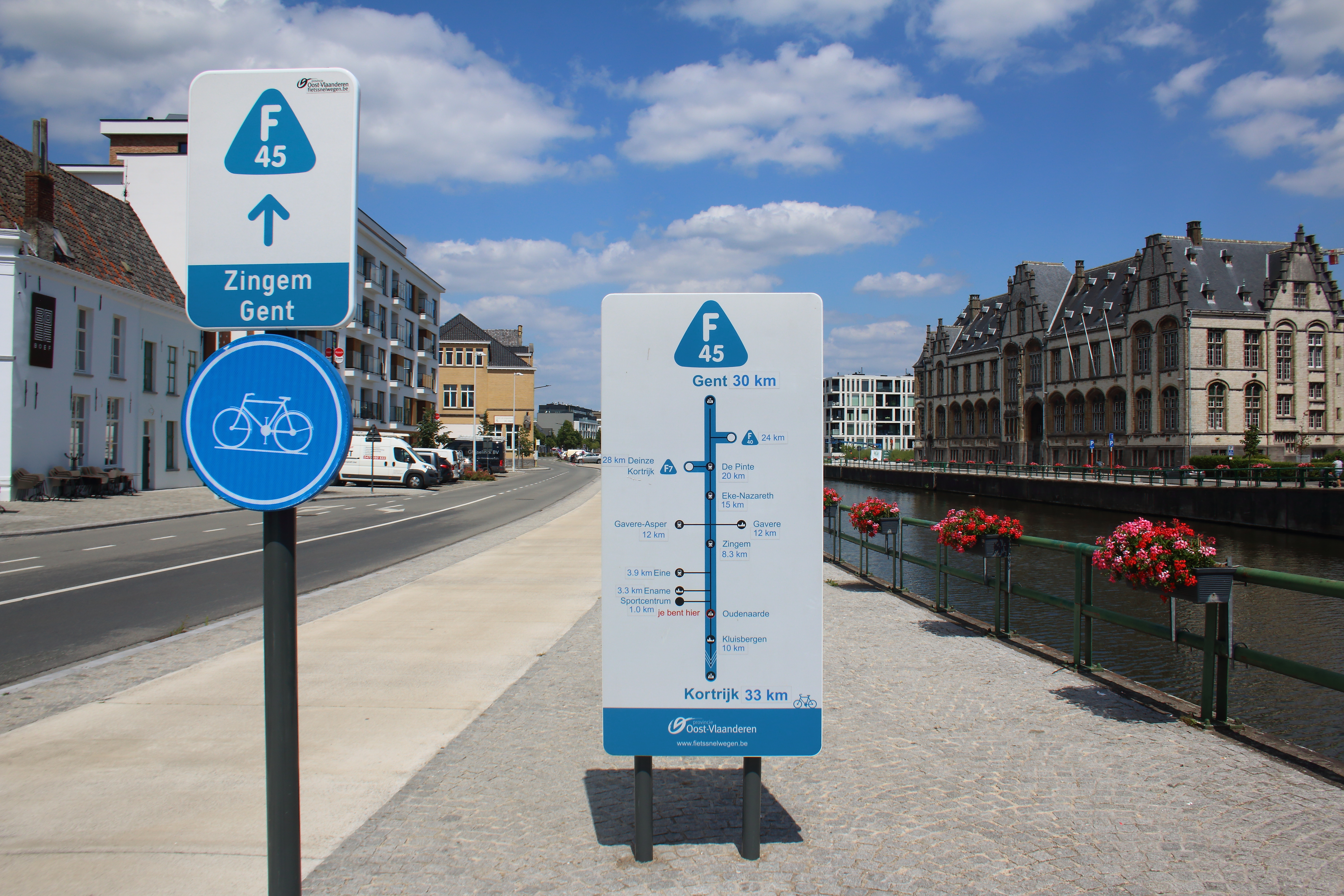 Fietssnelweg F45, Oudenaarde, Vlaanderen, België